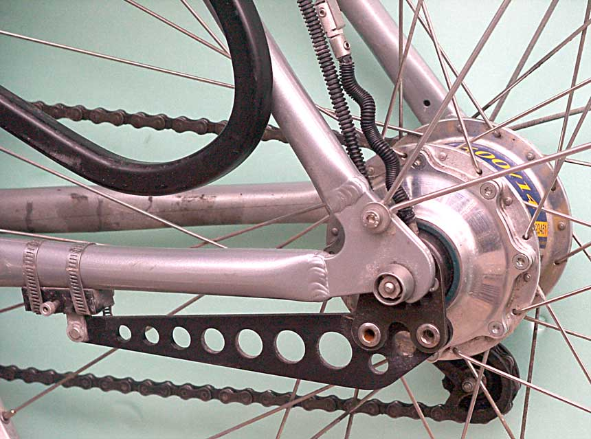 Rohloff Speedhub